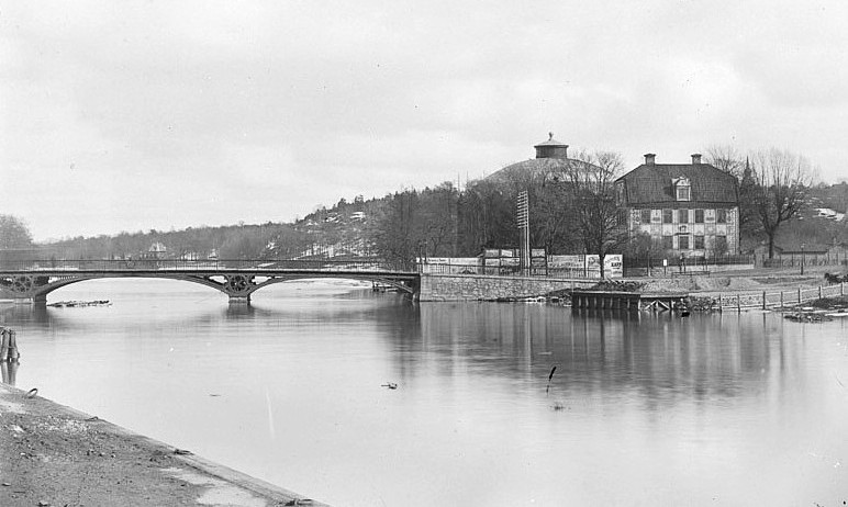 Gamla Djurgårdsbron (ritad av Petter Georg Sundius) från väster. På Djurgårdssidan den Pontinska villan och Rundmålnings -(Panorama-)byggnaden